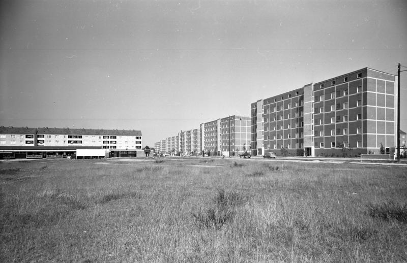 Wohnungsbau: Nürnberg-Langwasser